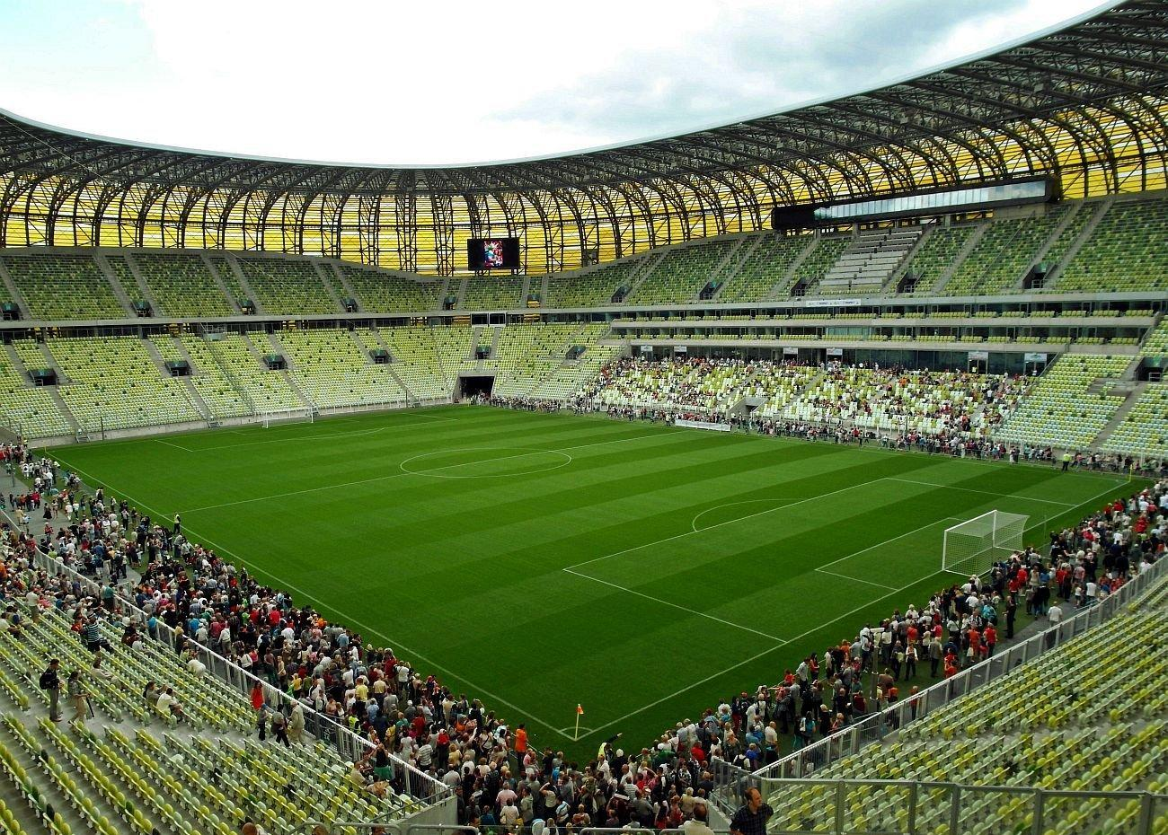 Boisko stadionu w Letnicy. Bliżej z lewej sektor "żółty", z prawej "zielony". W głębi po lewej sektor "niebieski", na prawo sektor "czerwony" VIP-owski i miejsca dla komentatorów.